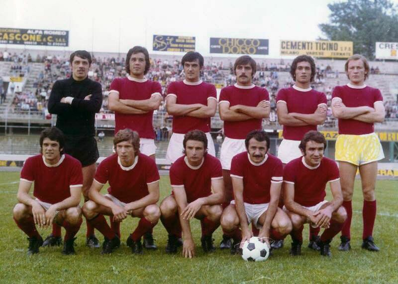 Una formazione del Varese nella stagione 1972-73; si riconosce (in piedi, secondo da destra) Claudio Gentile.